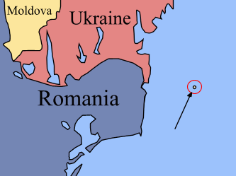 Snake Island